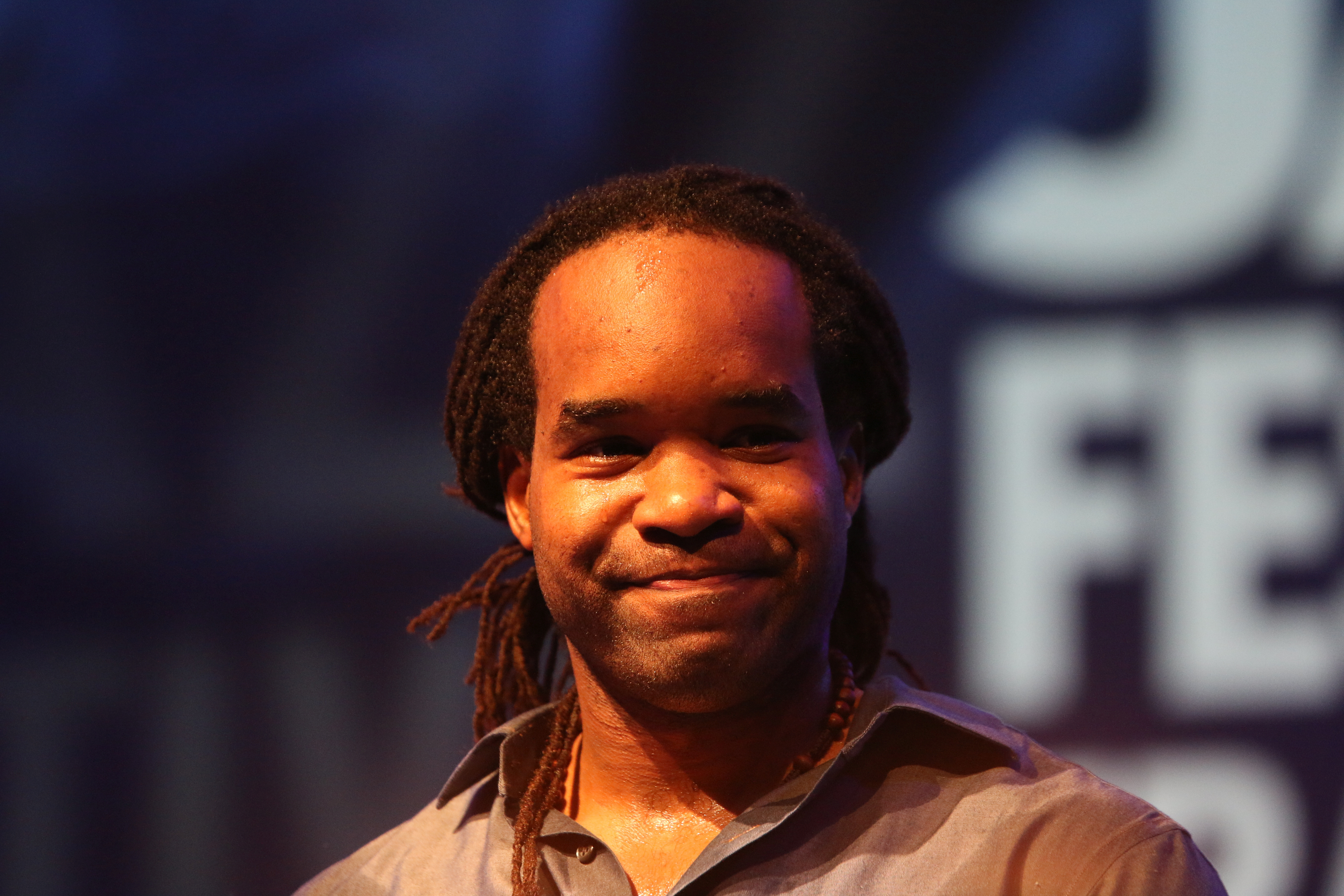 46. Deutsches Jazzfestival Frankfurt 2015: Mark Turner Quartett: Obed Calvaire